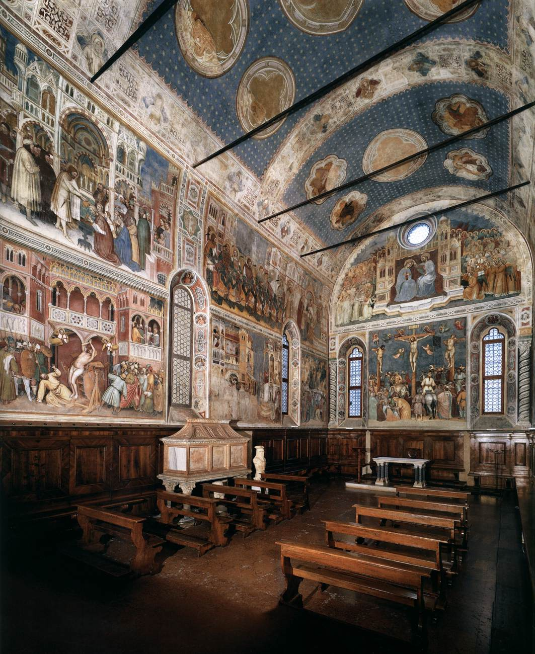 Oratorio di San Giorgio (Padova) - Affreschi Vista dell'interno dell'Oratorio.